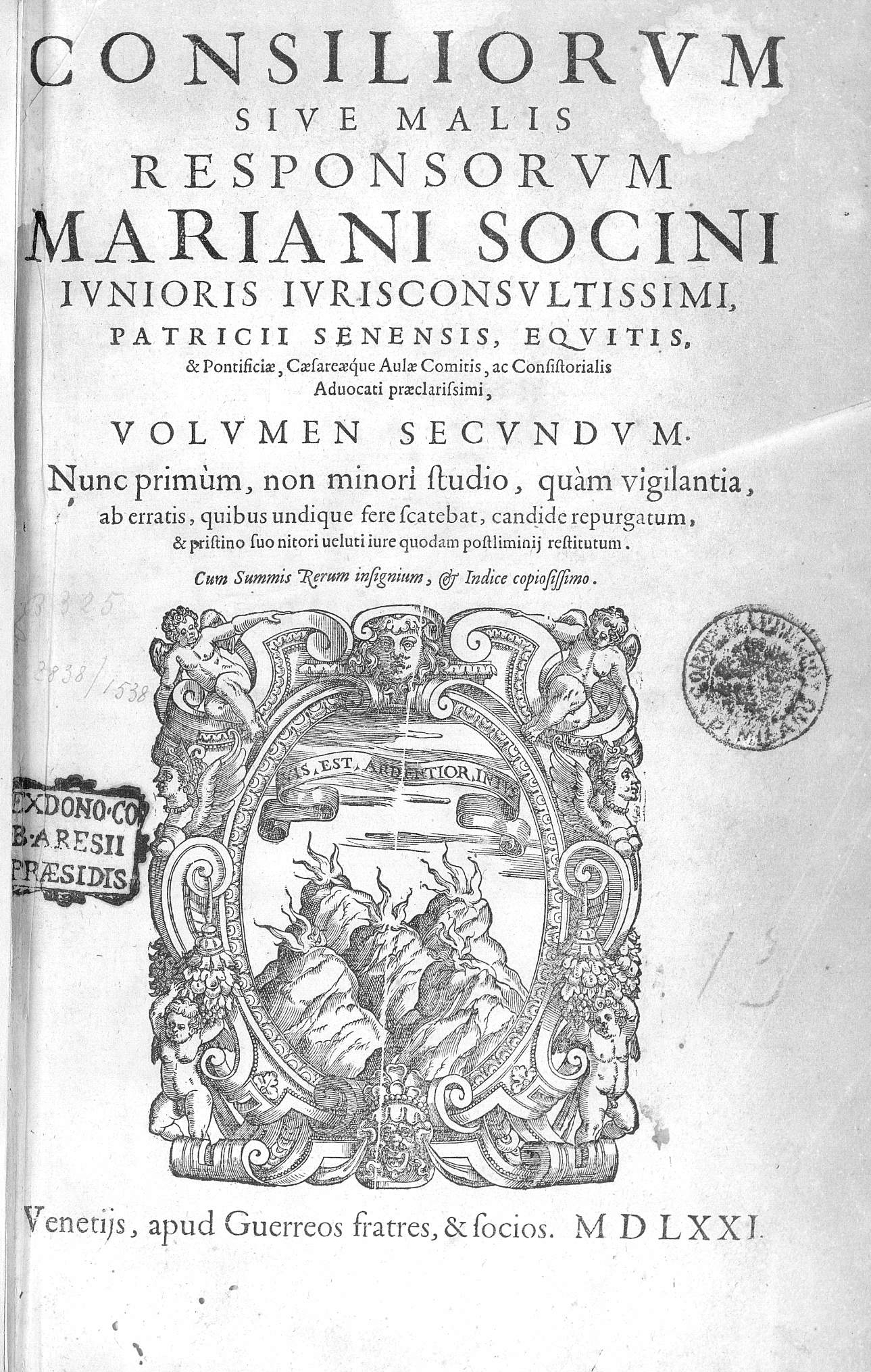 Frontespizio